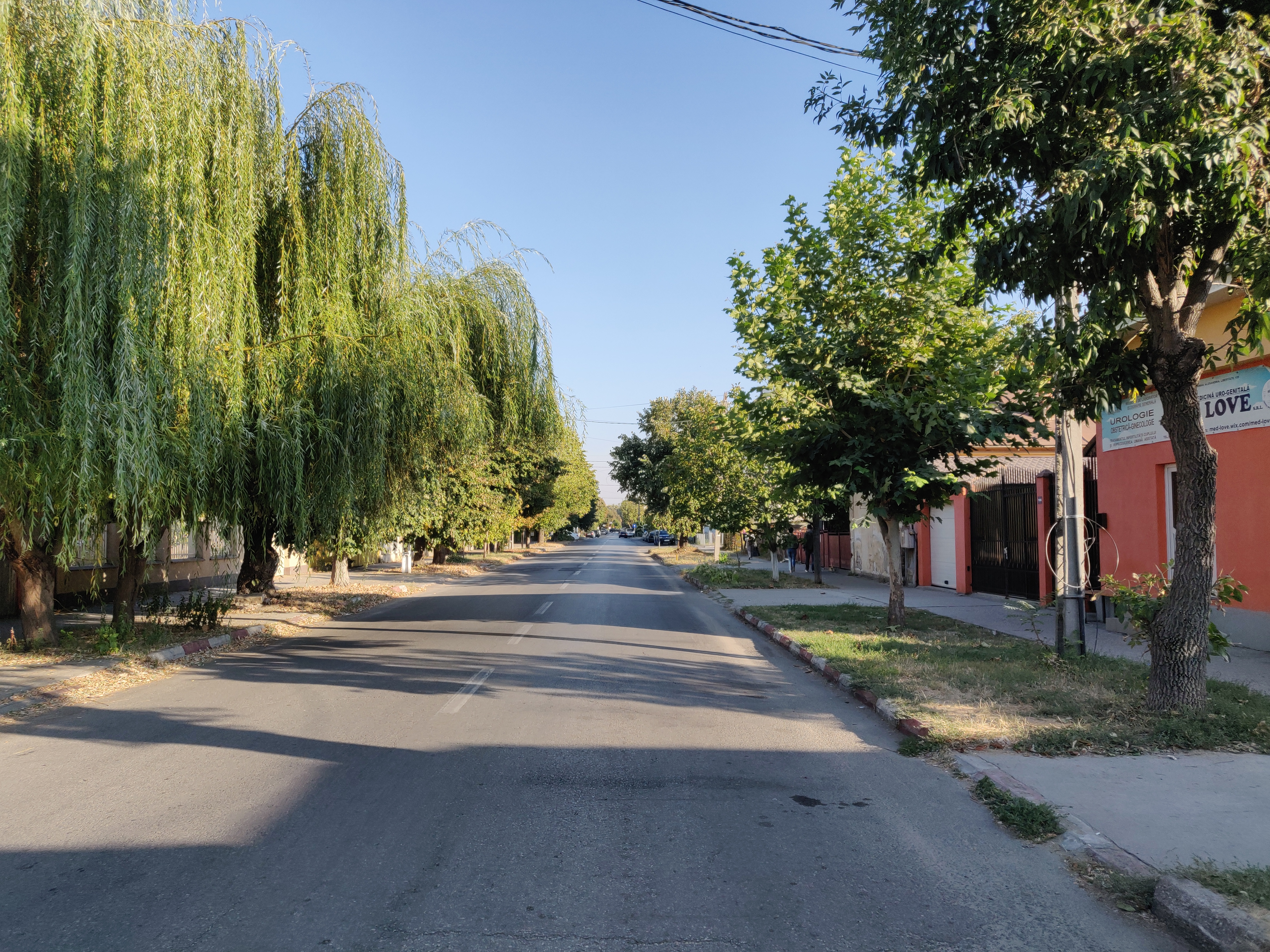 Ansamblu urban „Str. Libertății”, dinspre strada 1 Decembrie spre strada Ion Creangă